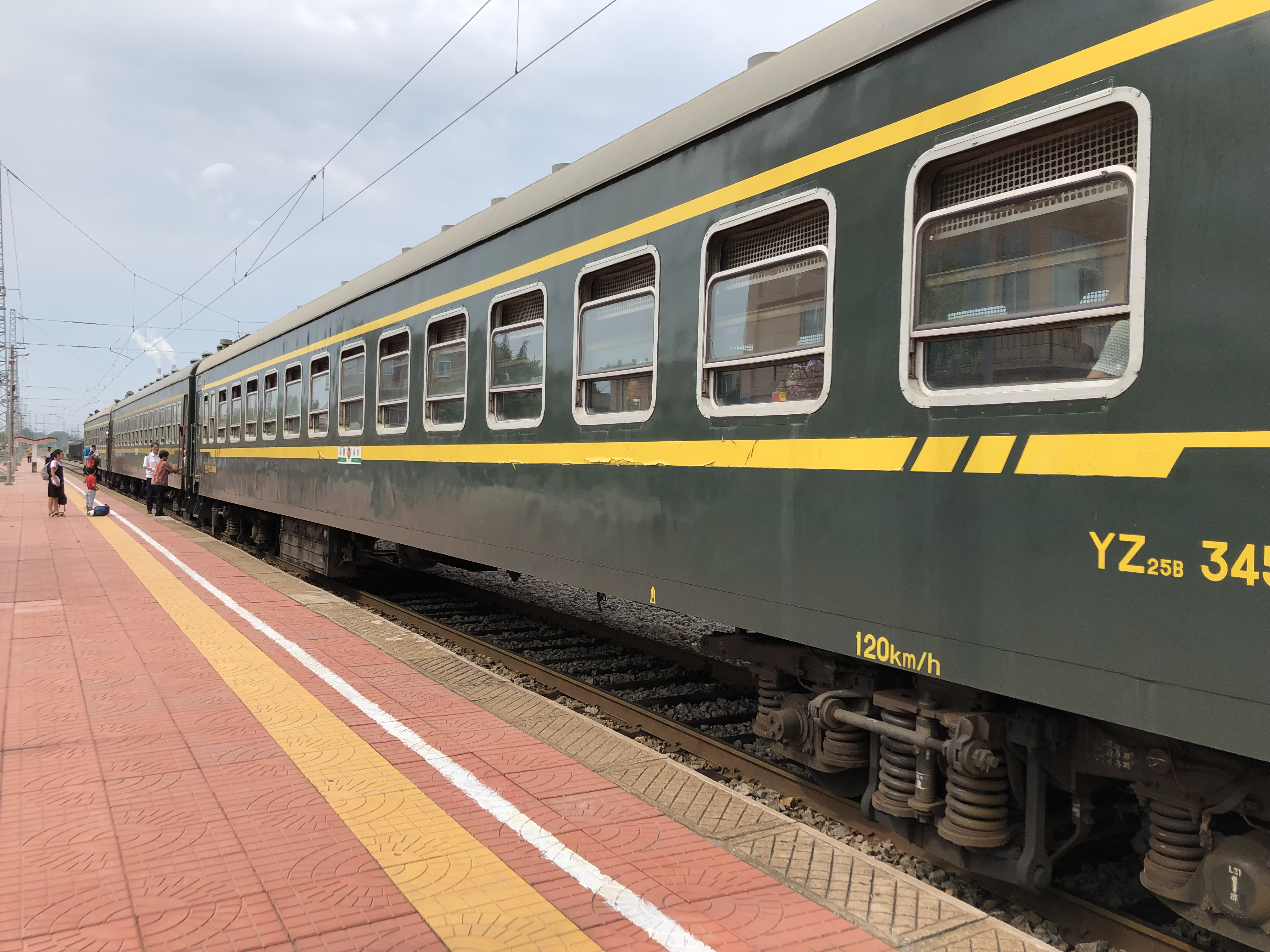 中文（中国大陆）: 7053/7054次列车次列车停靠于莱芜东站。